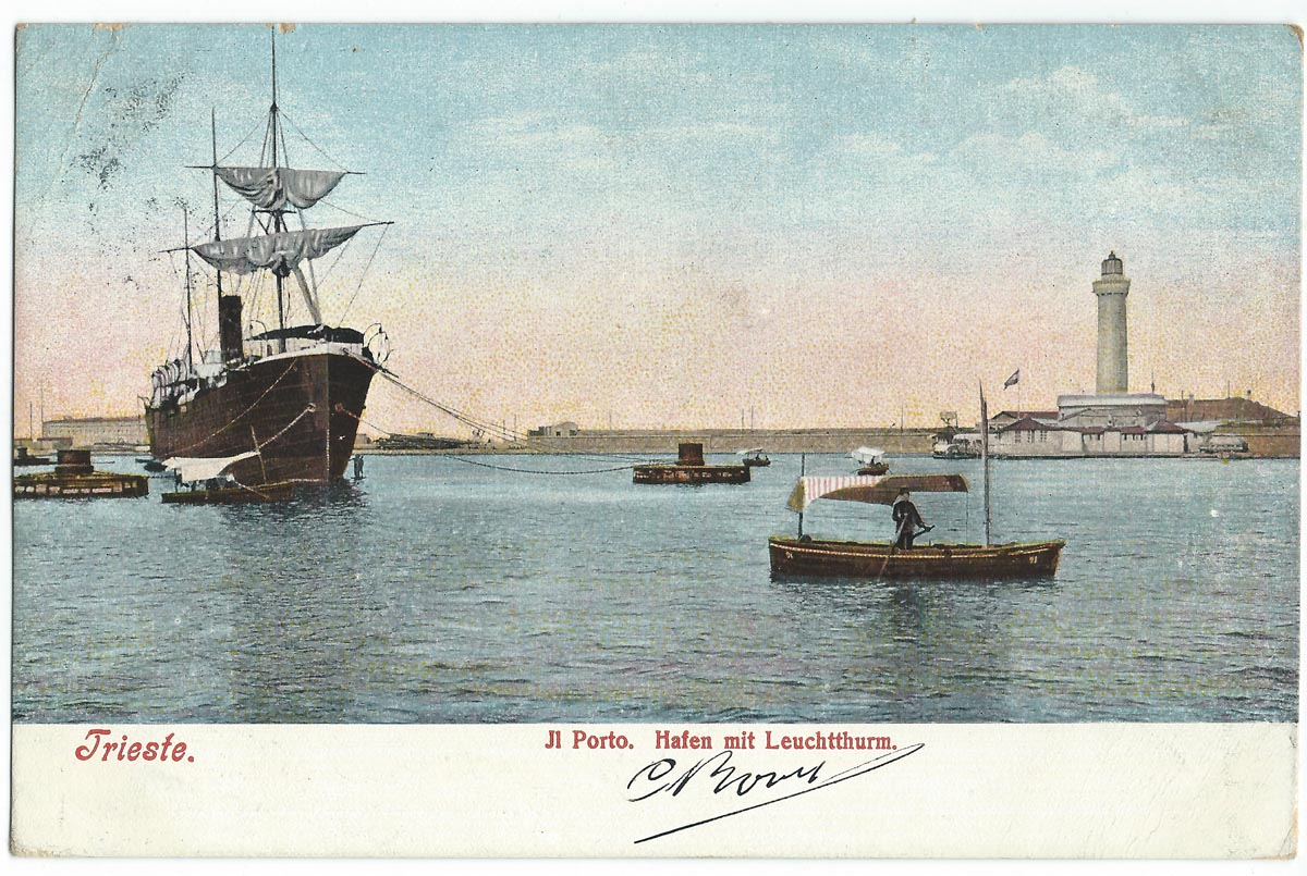 Vue de Trieste au début du XXe siècle.